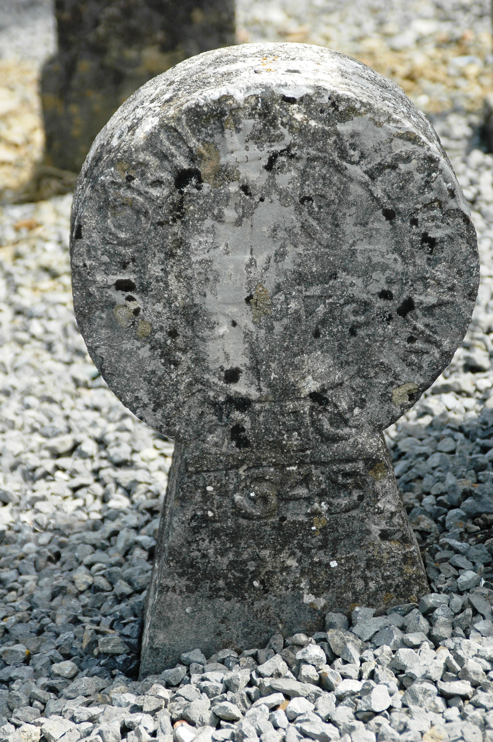 Stèles basques à Arhansus